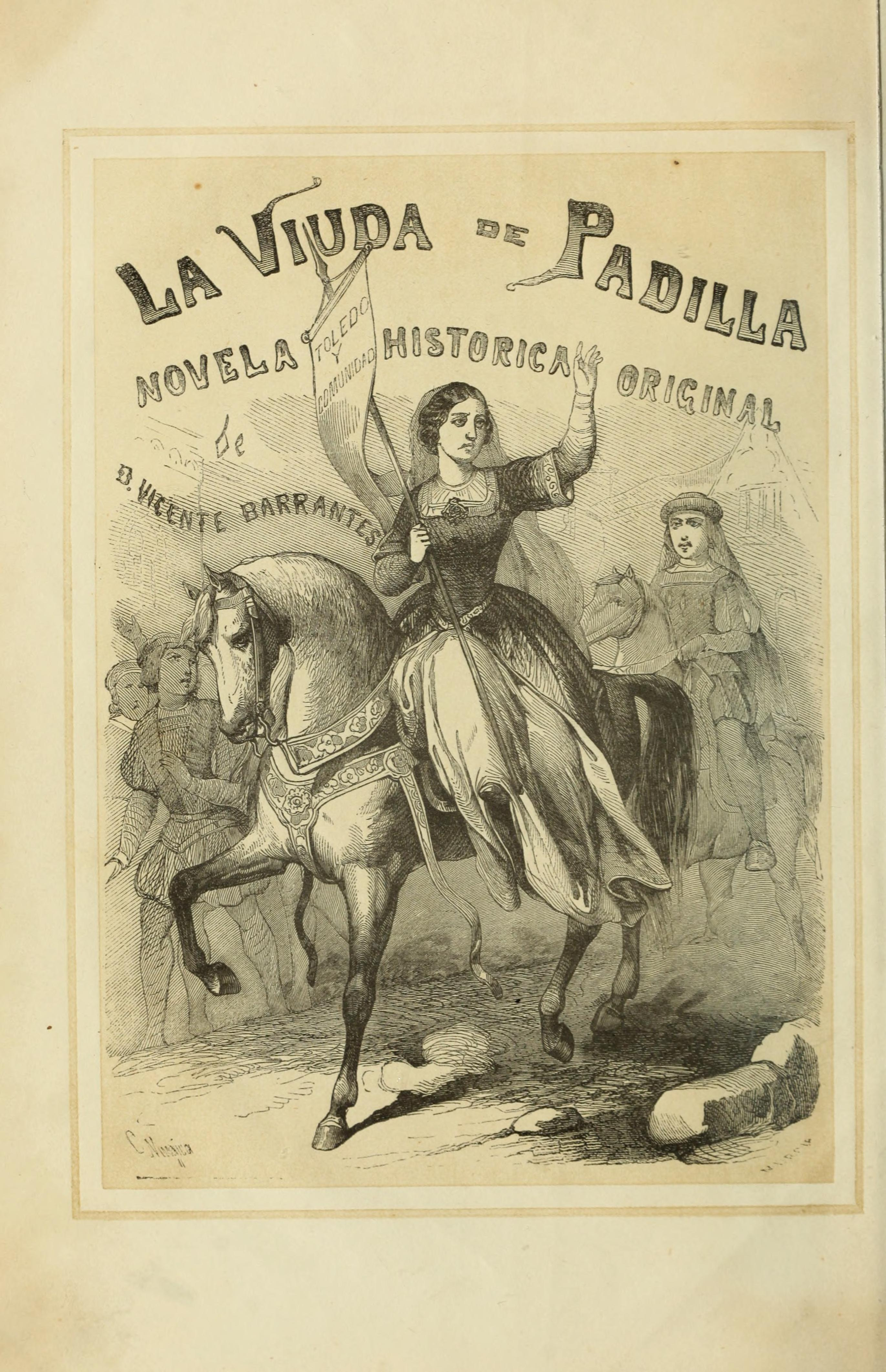 La viuda de Padilla, novela histórica original.